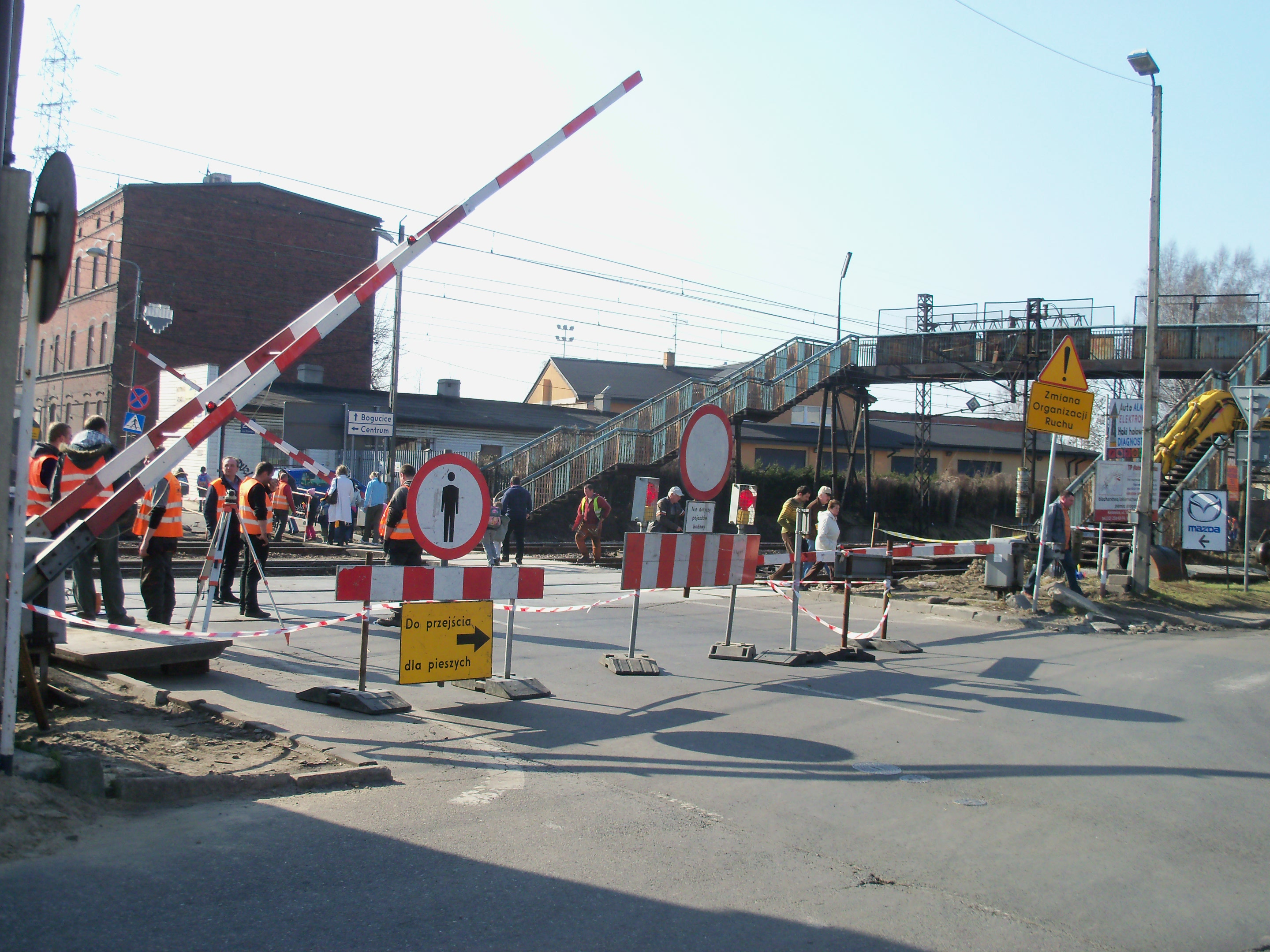 remont przejazdu kolejowego w rejonie ul. gen. Henryka Le Ronda w Katowicach - Dąbrówce Małej (marzec 2011)